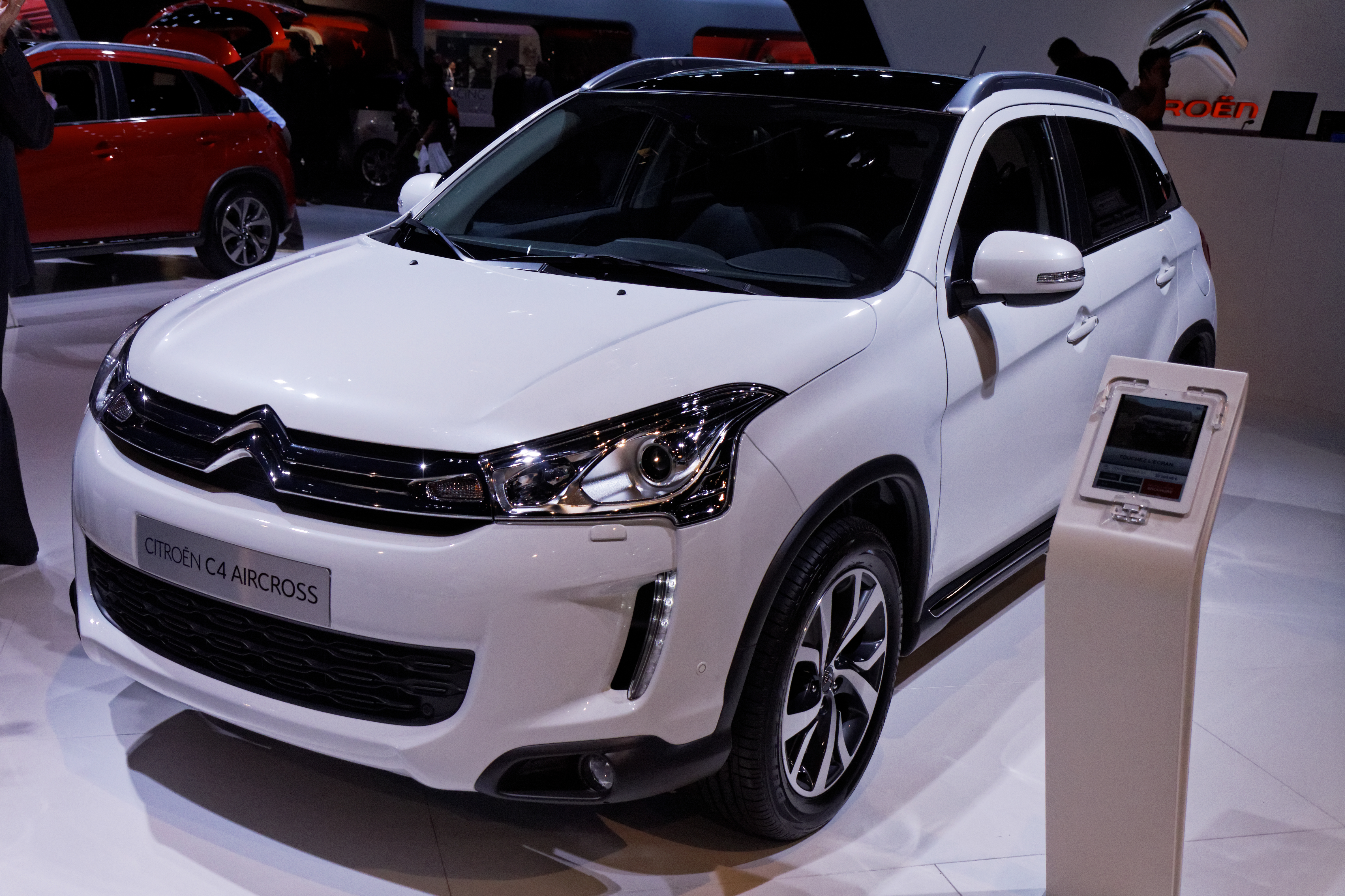 Une Citroën C4 Aircross présentée lors du Mondial de l'Automobile de Paris 2012.